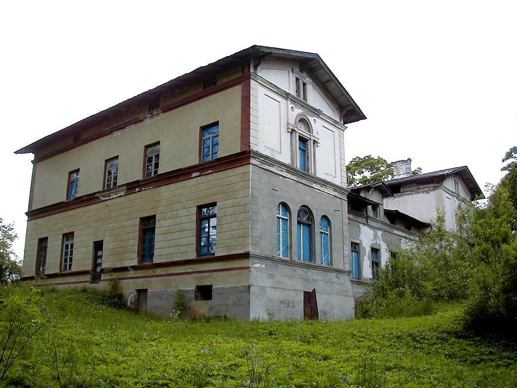 Vērenes muiža 2001-06-02